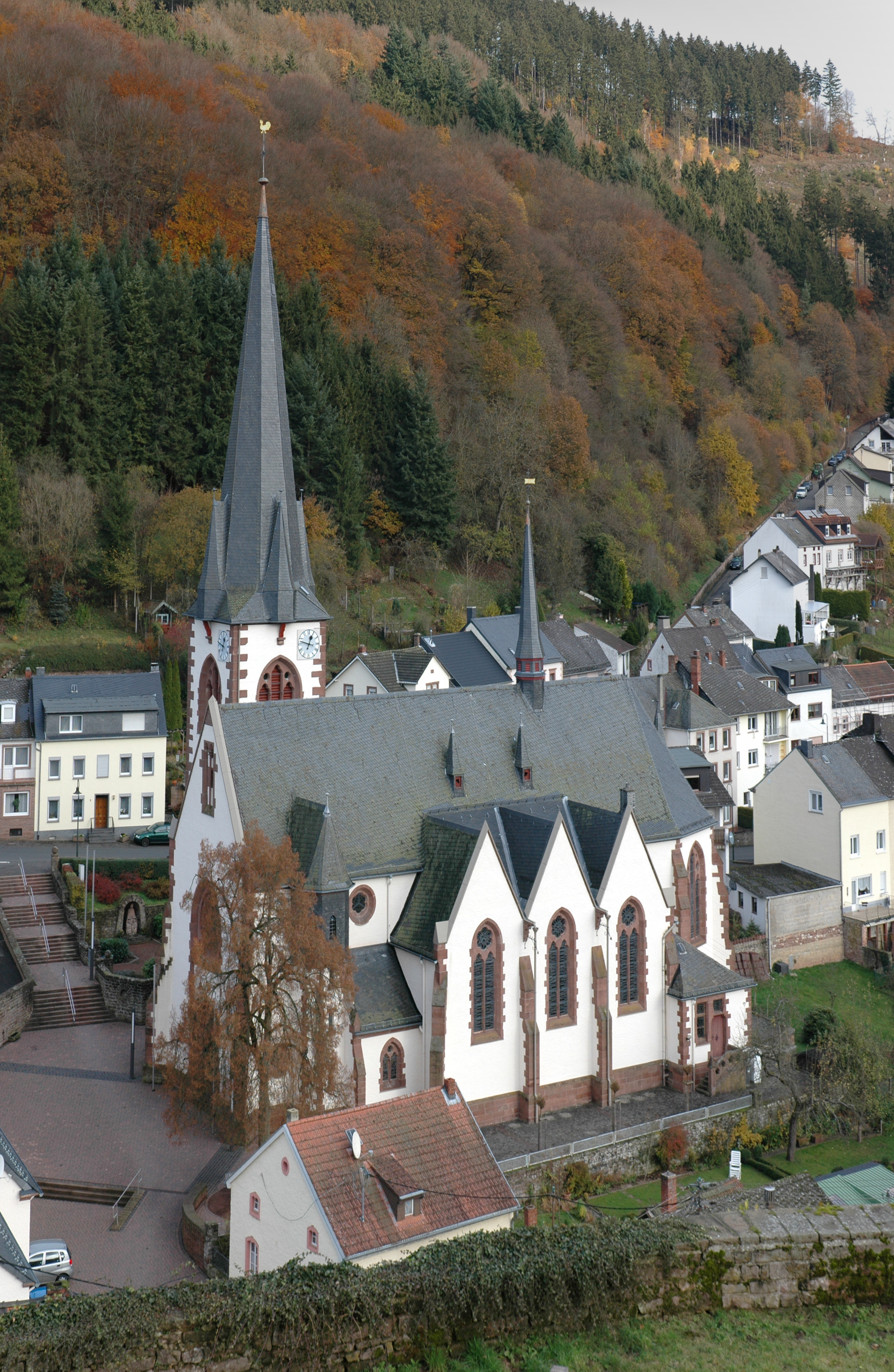 Kirche Sankt Quirin in Kyllburg-Malberg